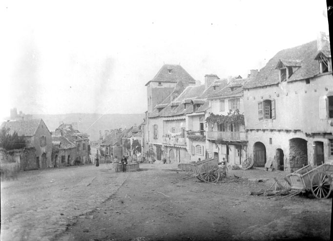 Fonds Trutat - Photographie ancienne Cote : TRU C 661 Localisation : Fonds ancien (S 30) Original non communicable Titre : Place de Najac, Aveyron Auteur : Trutat, Eugène Rôle de l’auteur : Photographe Lieu de création : Najac (Aveyron) Date de création : 1859-1910 [entre] Mesures : : 9 x 12 cm Observations : Plaque très claire voire opaque Mot(s)-clé(s) : -- Place -- Maison -- Village -- Toit -- Arbre -- Charrette -- Enfant -- Colline -- Najac (Aveyron) -- Najac (Aveyron ; canton) -- Midi-Pyrénées (France) -- Pyrénées (France) -- 19e siècle, 2e moitié -- 20e siècle, 1e quart Médium : Photographies -- Négatifs sur plaque de verre -- Noir et blanc -- Vues d'architecture -- Paysages urbains Voir : TRU C 658 Rue et château de Najac, Aveyron TRU C 659 Grande place de Najac, Aveyron TRU C 664 Le château de Najac vu de la rue, Aveyron, 31 août Bibliothèque de Toulouse. Domaine public